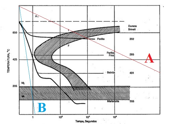 Curvas temperatura-tempo-transformação para um ferro fundido genérico. A linha vermelha mostra um resfriamento lento e a linha azul mostra um resfriamento rápido.